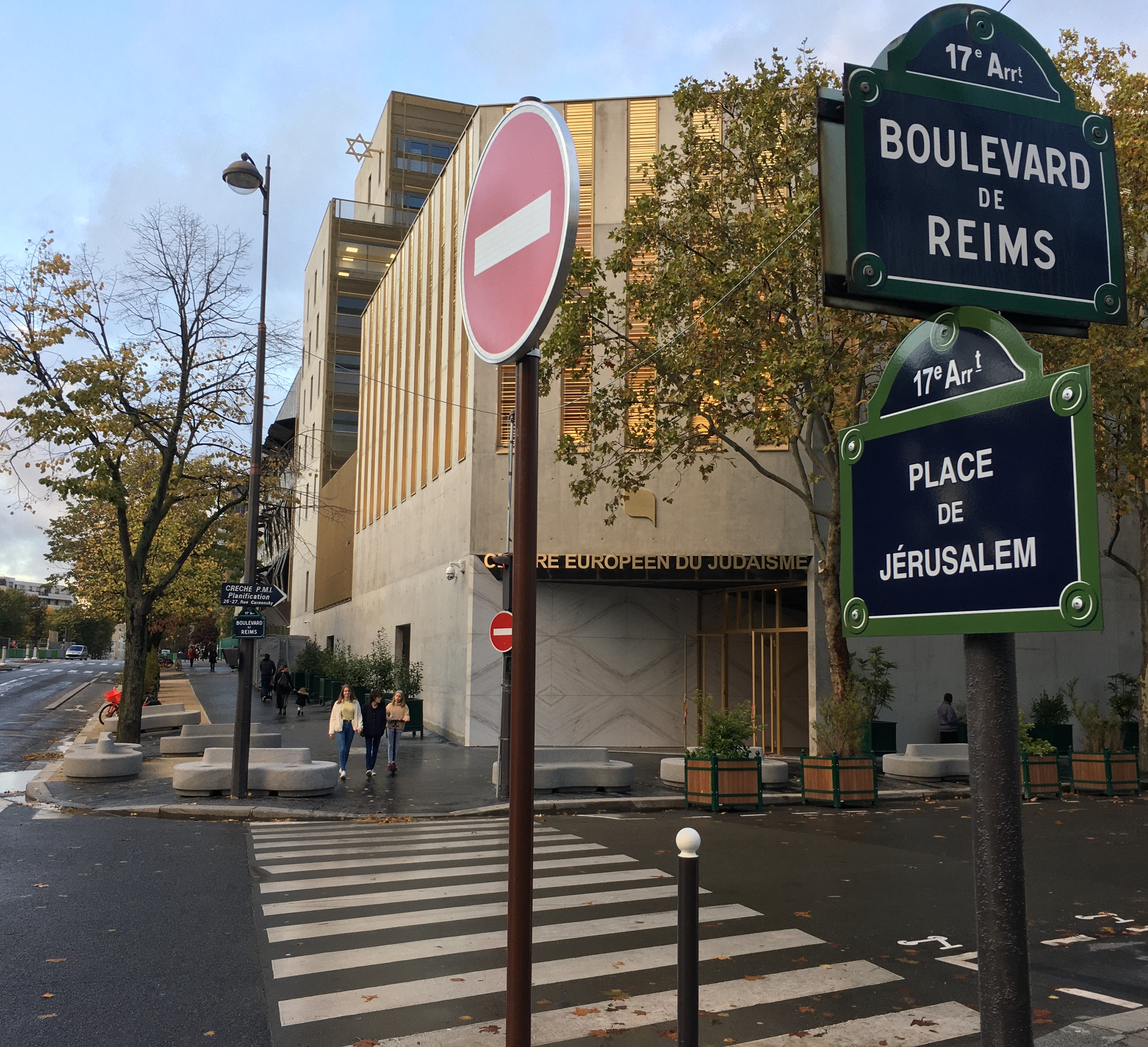 place de Jérusalem, Paris 17è